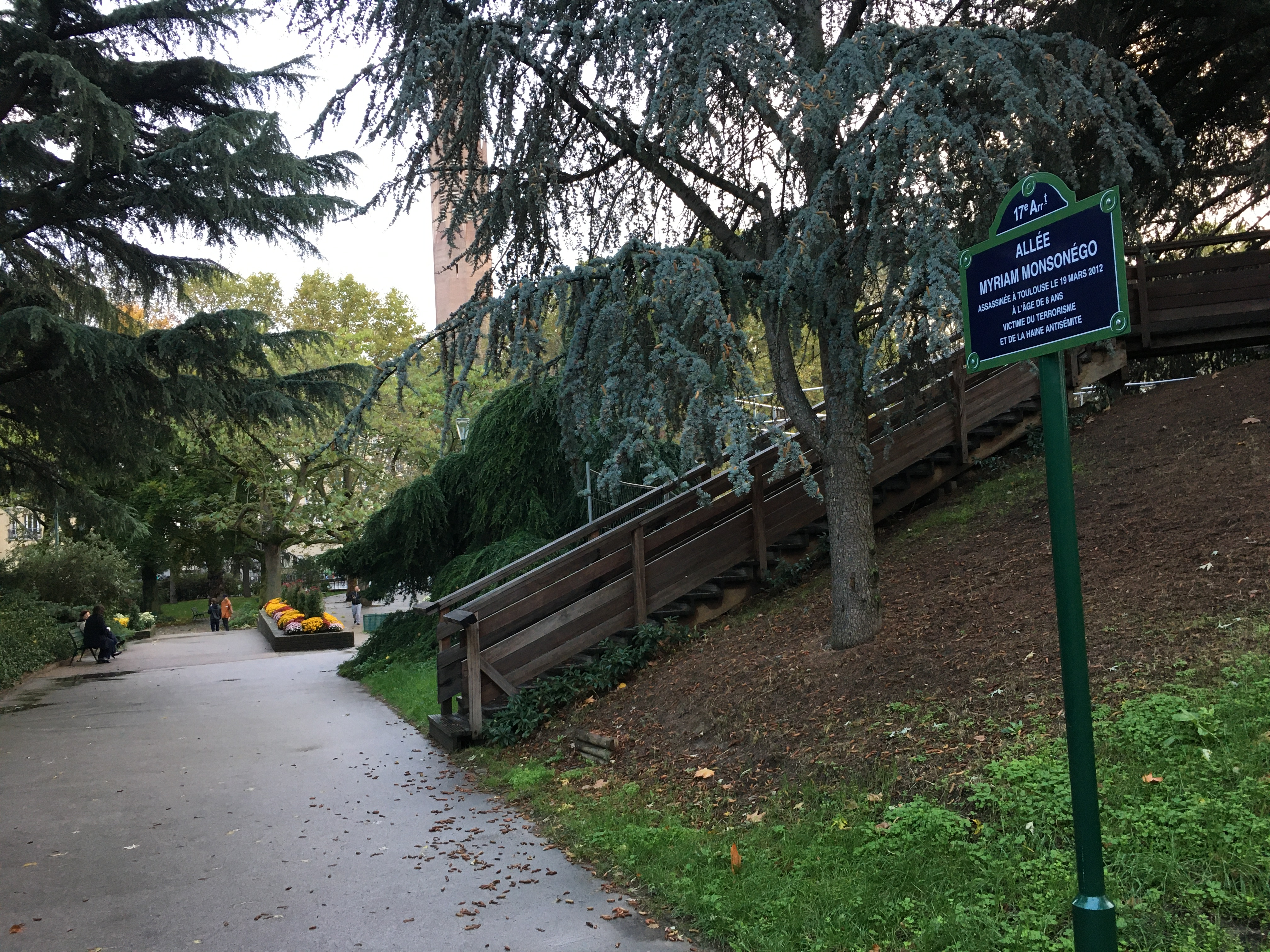 Allée Myriam Monsonego dans le square Sainte-Odile à Paris 17è en souvenir d'une des victimes de l'attentat de 2012 à Toulouse